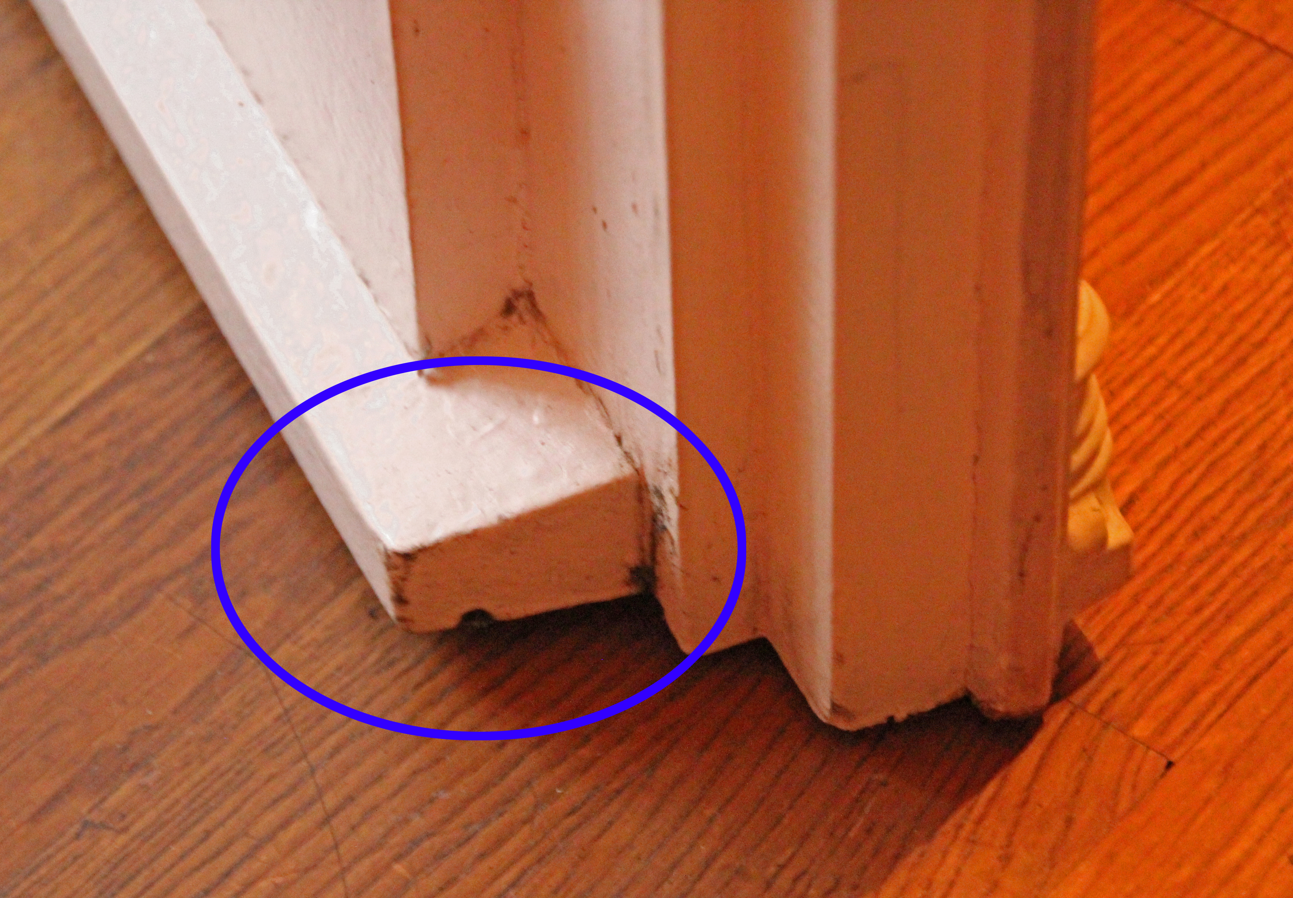 Bildinhalt: Wetterschenkel (links mit Tropfnase) an einer Balkontür. Hervorhebung durch einen blauen Kringel. Aufnahmeort: Worms, Deutschland